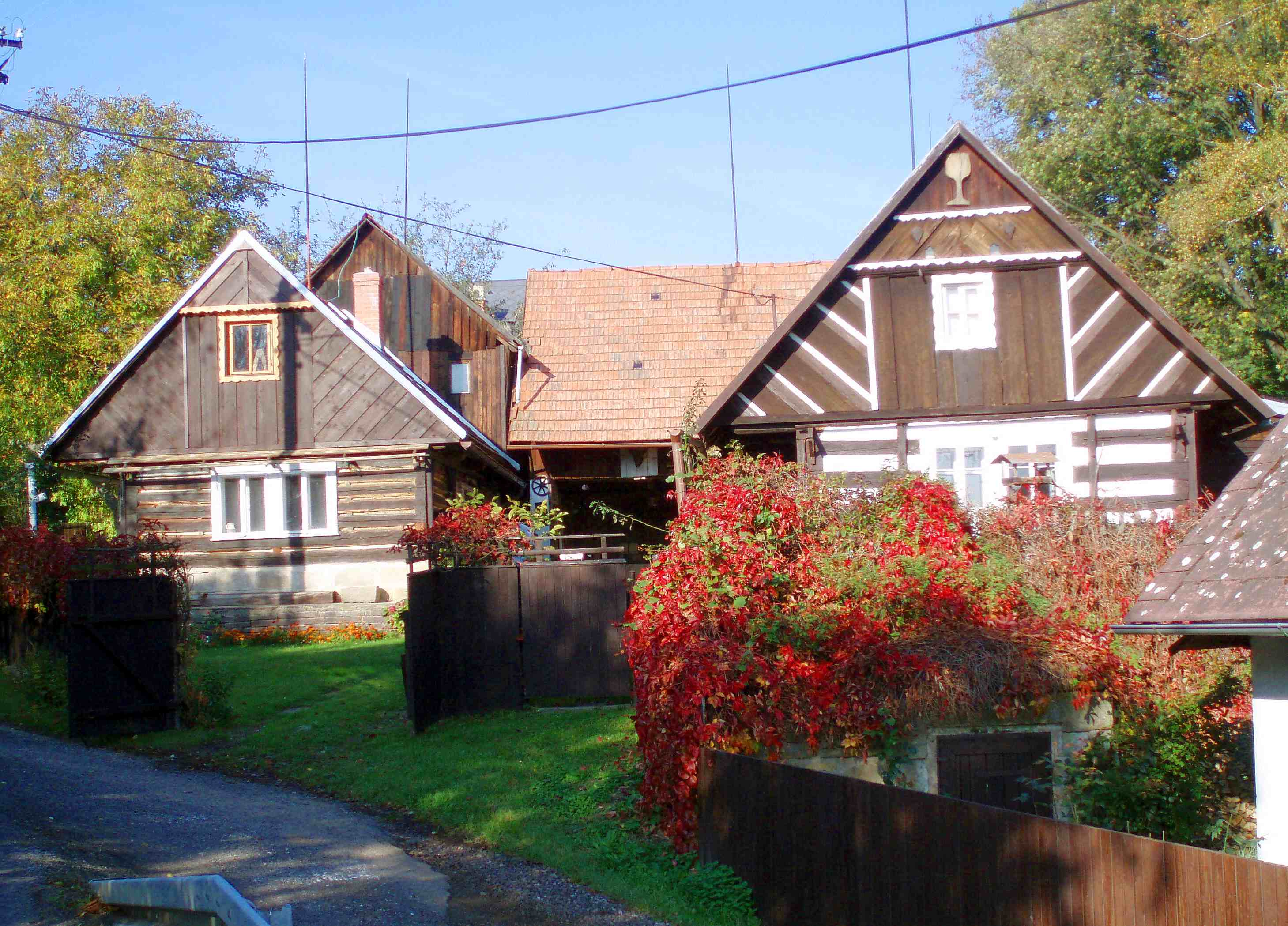 Volksarchitektur in Böhmen. Bauernhäuser im Ortsteil Stéblovice.